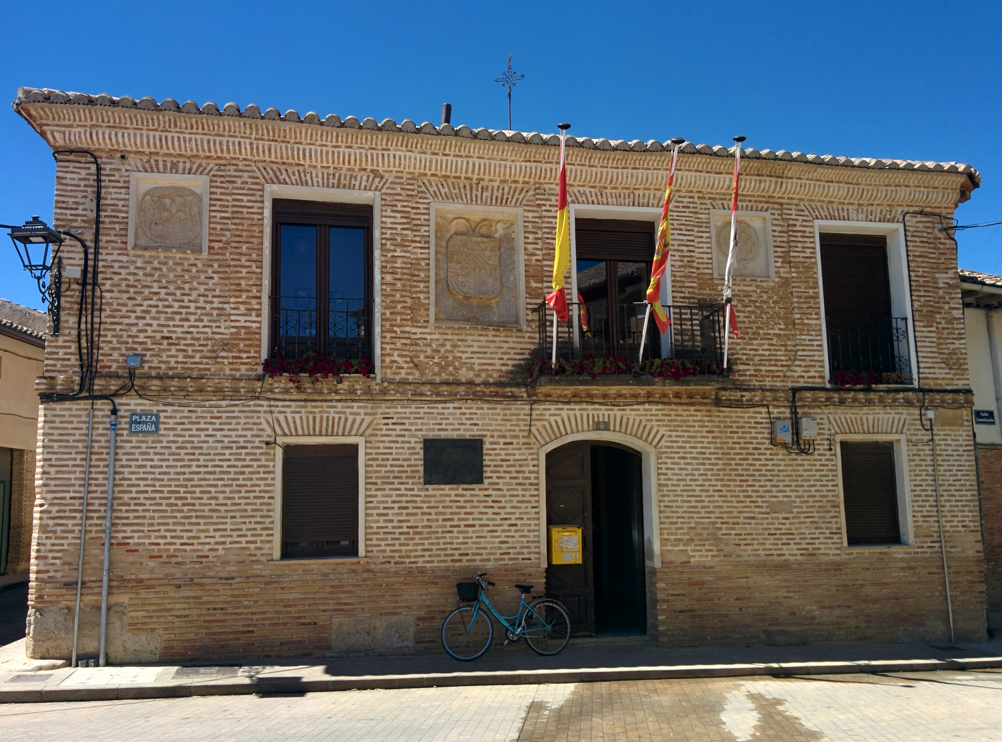 Casa consistorial de Cisneros (Palencia, España).